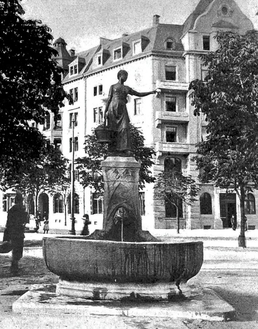 Brunnenskulptur 1907, Helvetiaplatz Zürich. Die Wasserträgerin. Valentin Walter Mettler (1868–1942) Bildhauer.